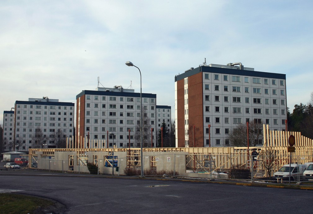 Jordbro, Stockholm, Sweden